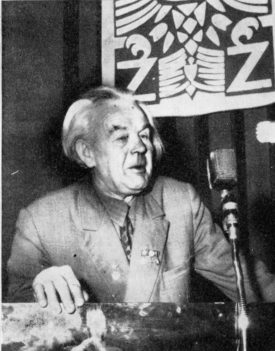 Jan Wawrzynek